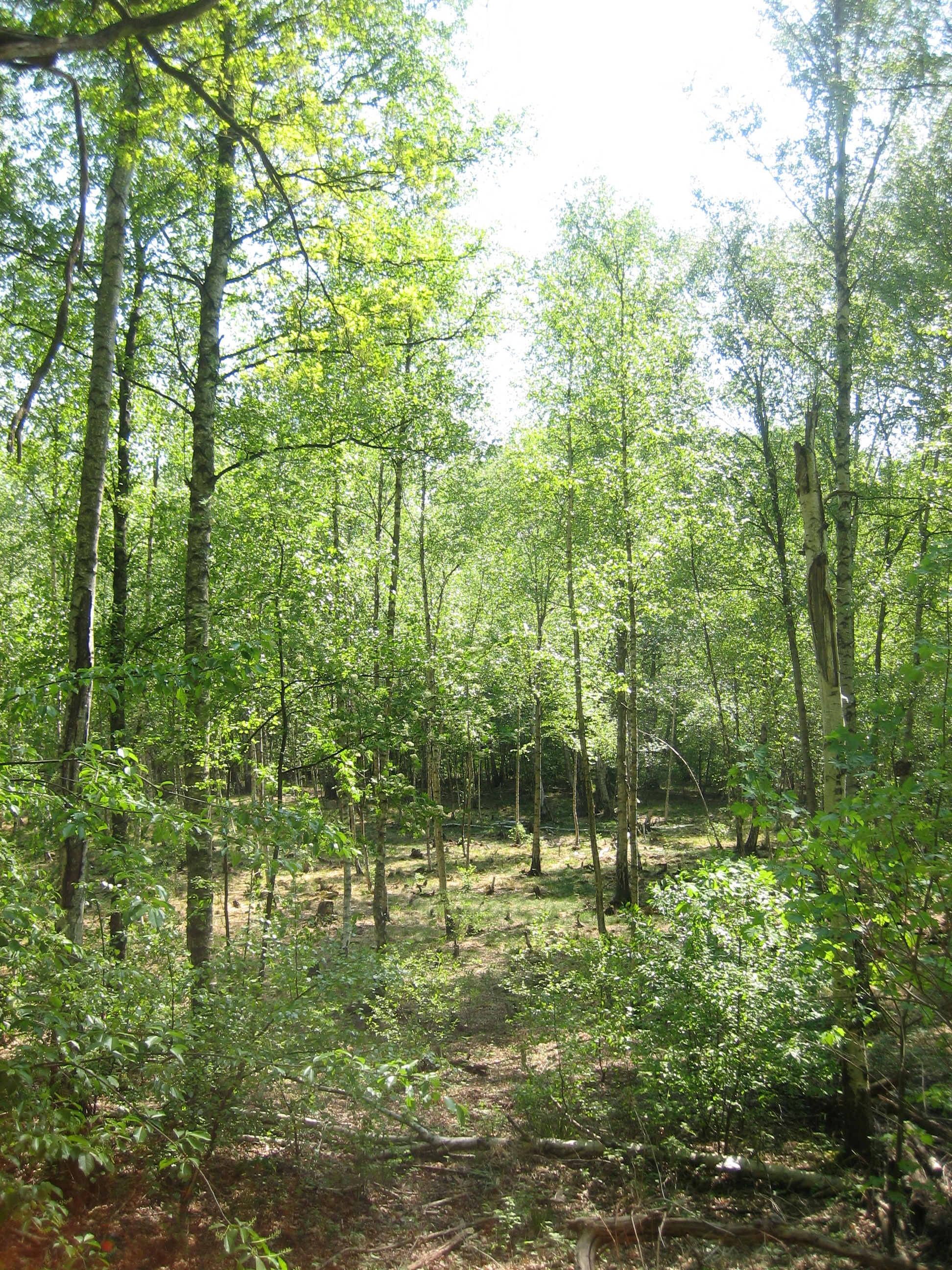 Teufelsfenn, Naturschutzgebiet im Südwesten Berlins